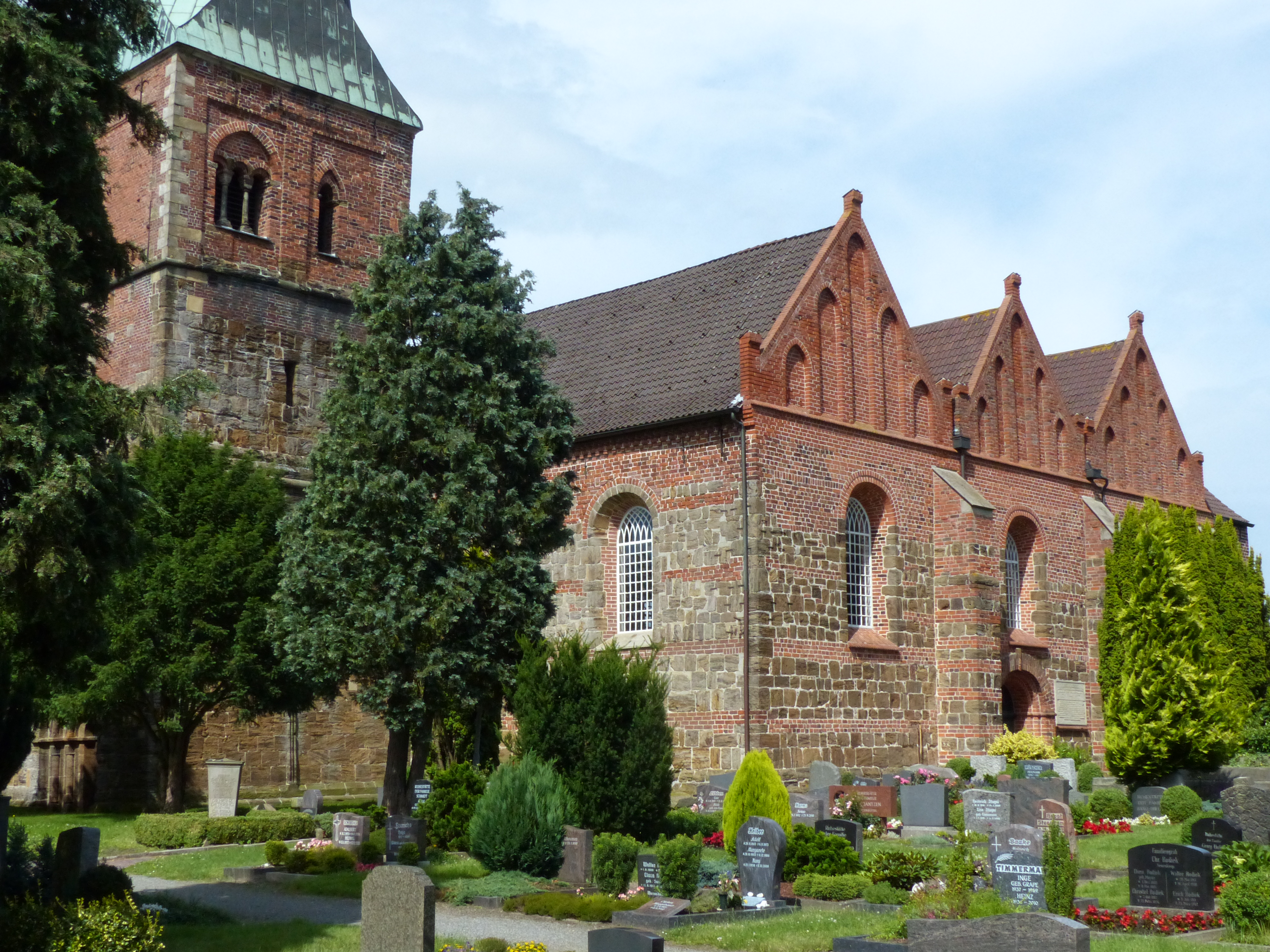 Südseite der St.-Aegidius-Kirche in Berne